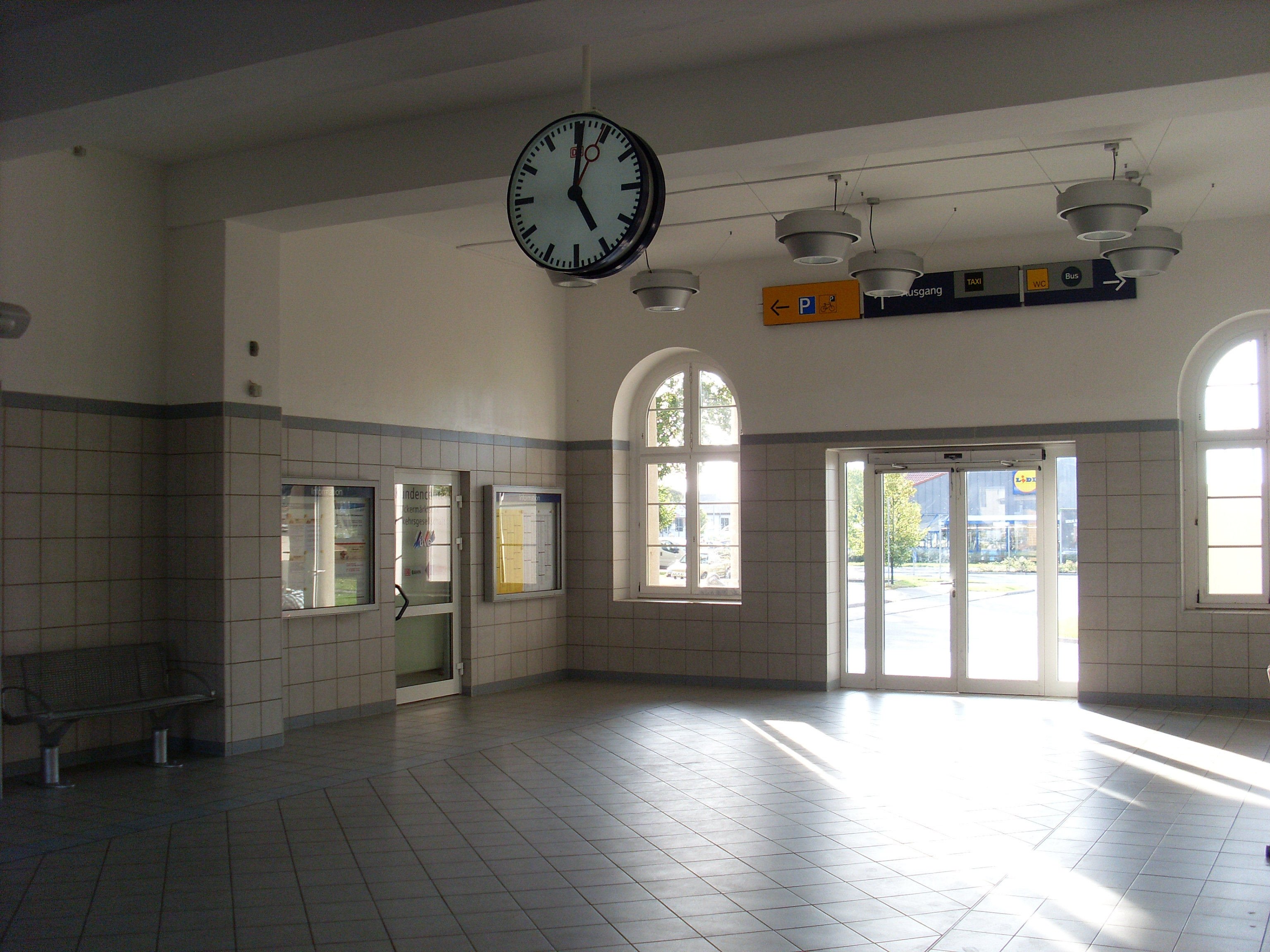 Bahnhofshalle Prenzlau (selbst fotografiert)